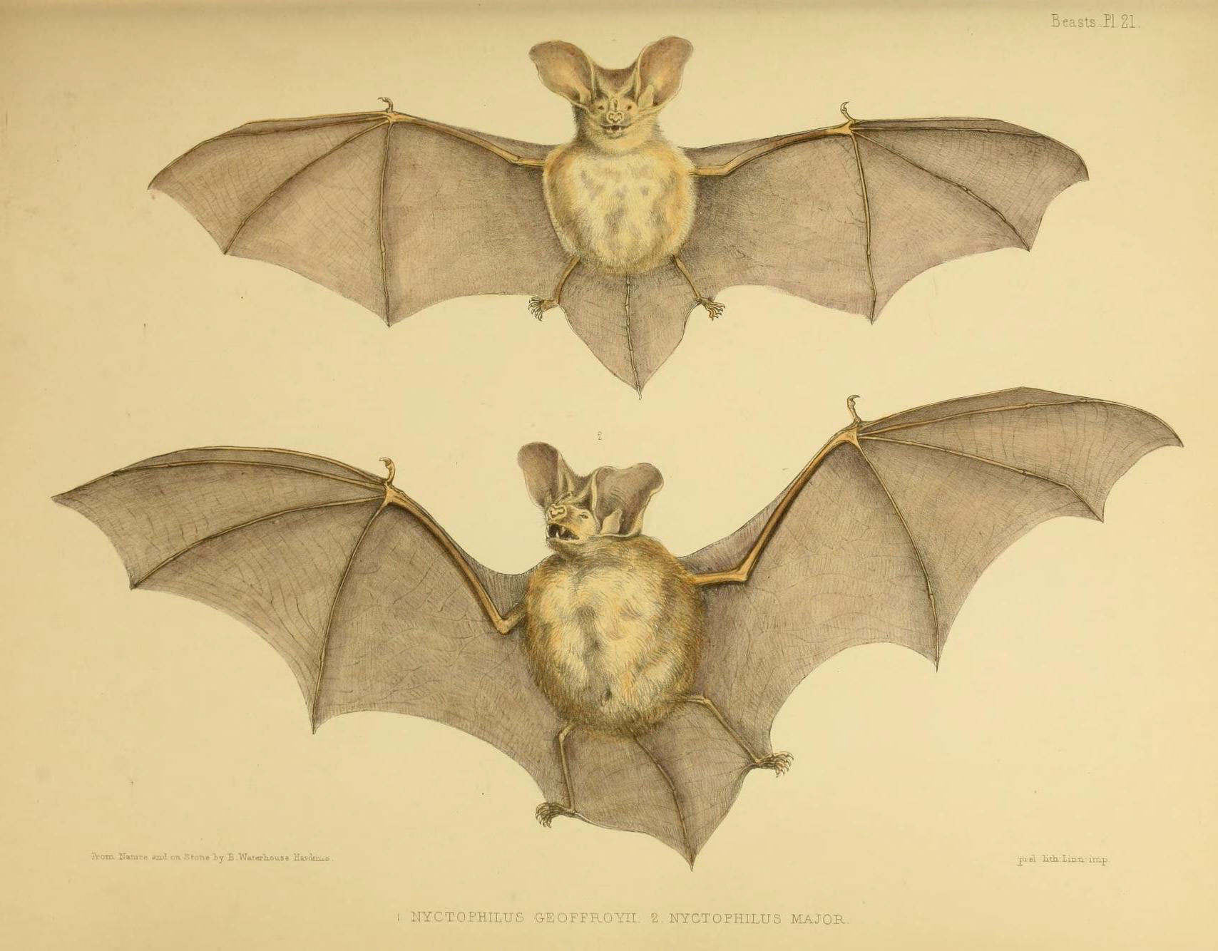 r V -»*'- x^ \ 5; O to •-1 I— . Oh O H O .^ o Cm o fd O CM O o